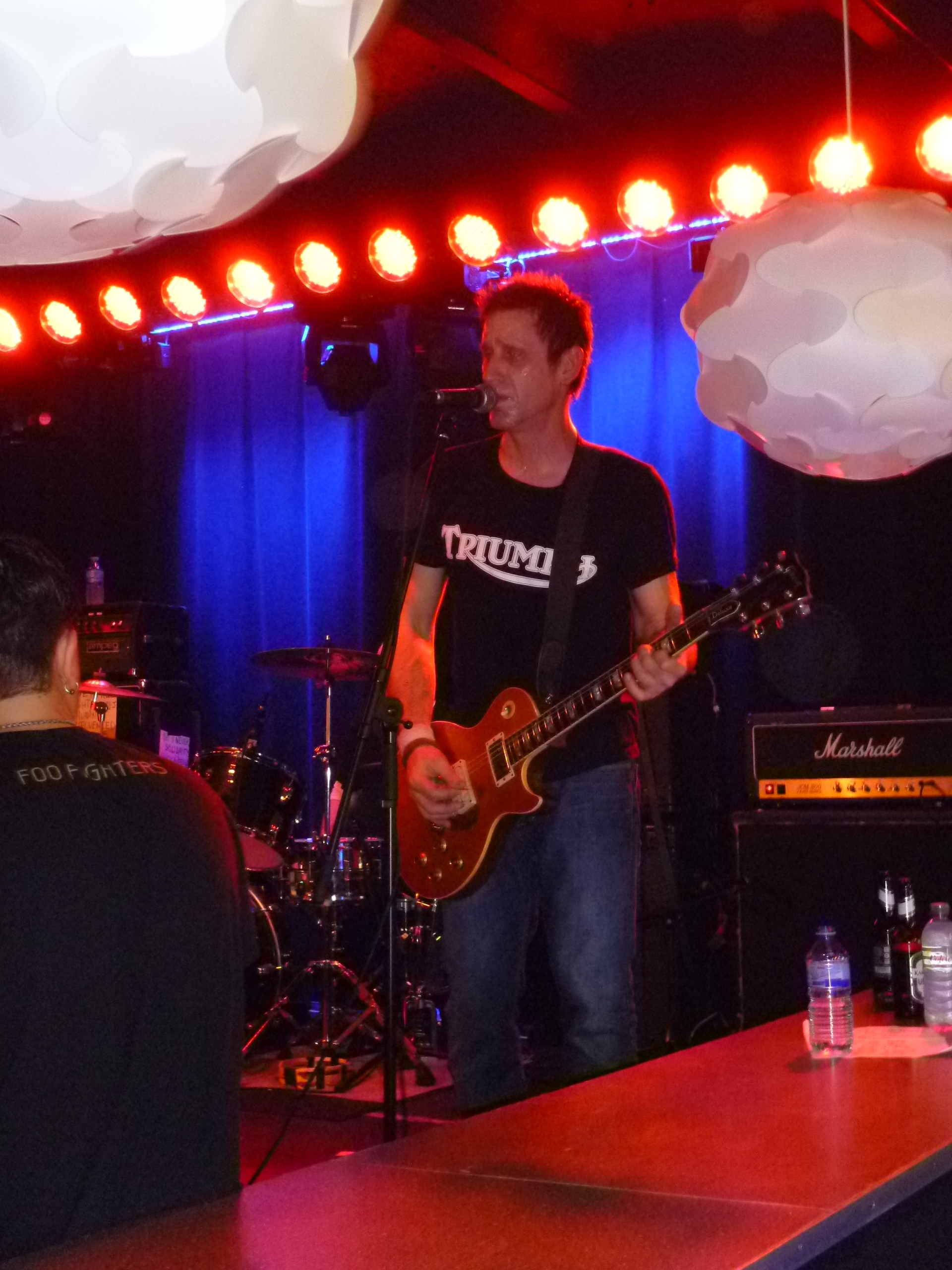 Franz Stahl of Scream live im Kleinen Klub (Saarbrücken)